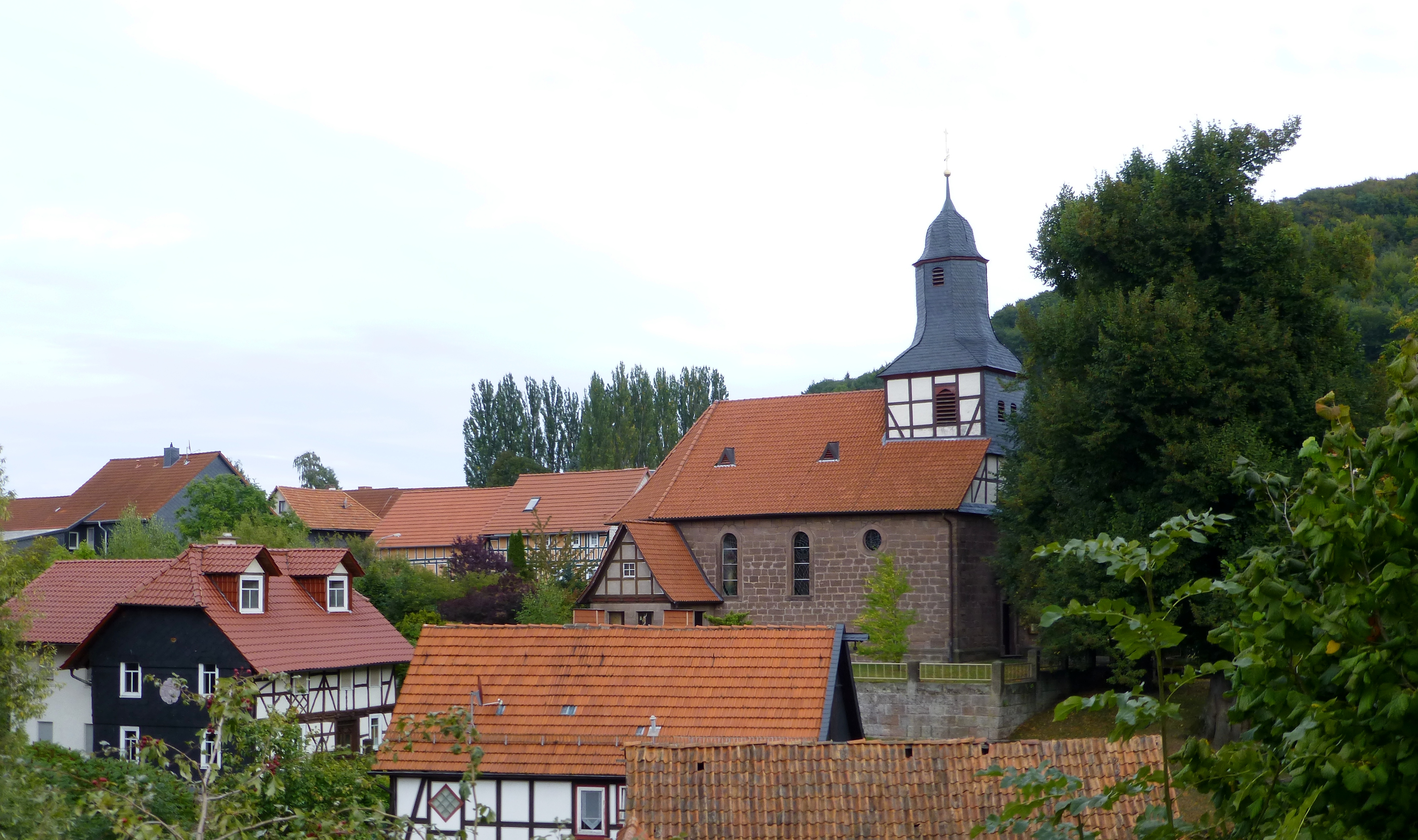 Katholische Kirche St. Martinus in Thalwenden, Landkreis Eichsfeld. Erbaut 1748